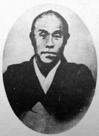 a Japanese man 由利公正 (Kimimasa Yuri)